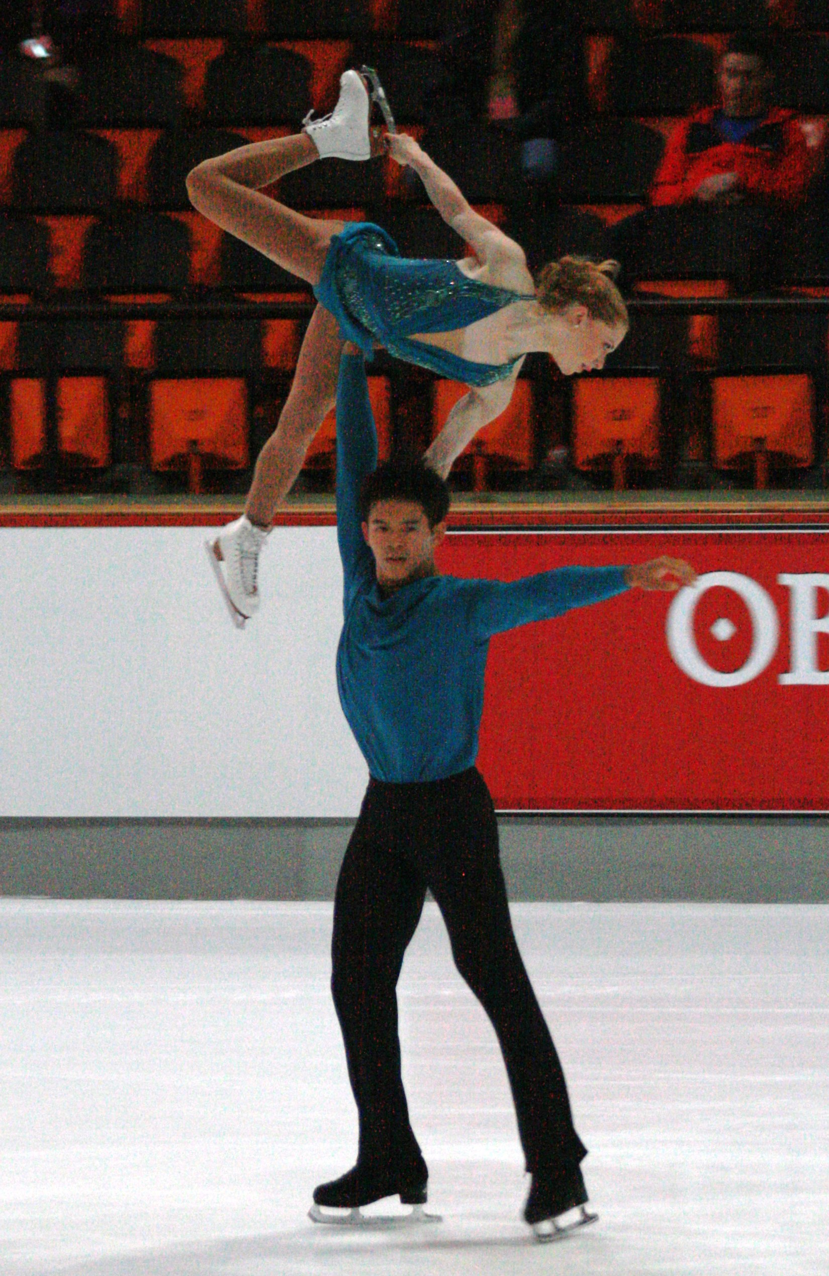 Наташа Пурич и Мервин Тран (Канада) на 2013 Nebelhorn Trophy